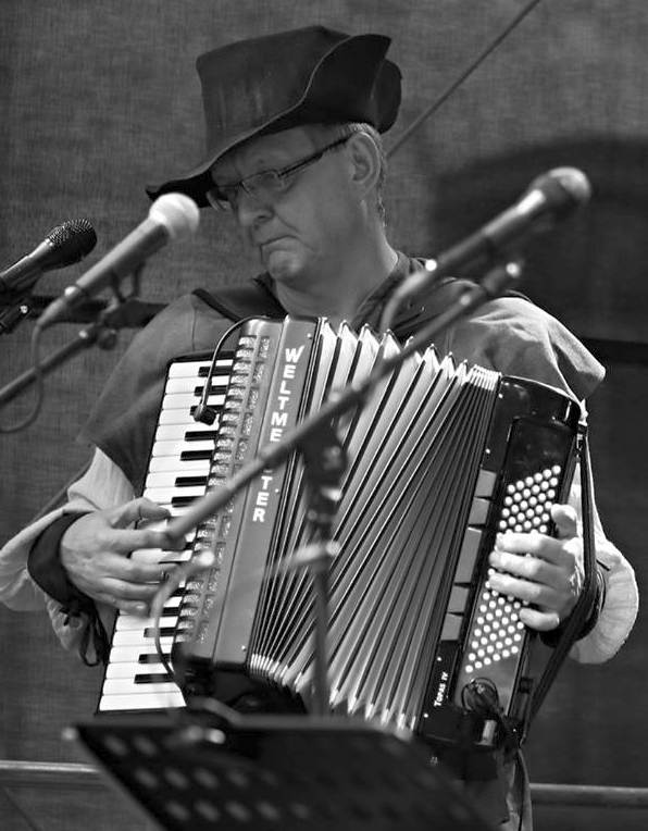 Vaňkovkafest 2016